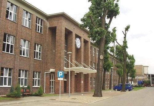 Poznań - fabryka Volkswagena, odlewnia na Dębcu.